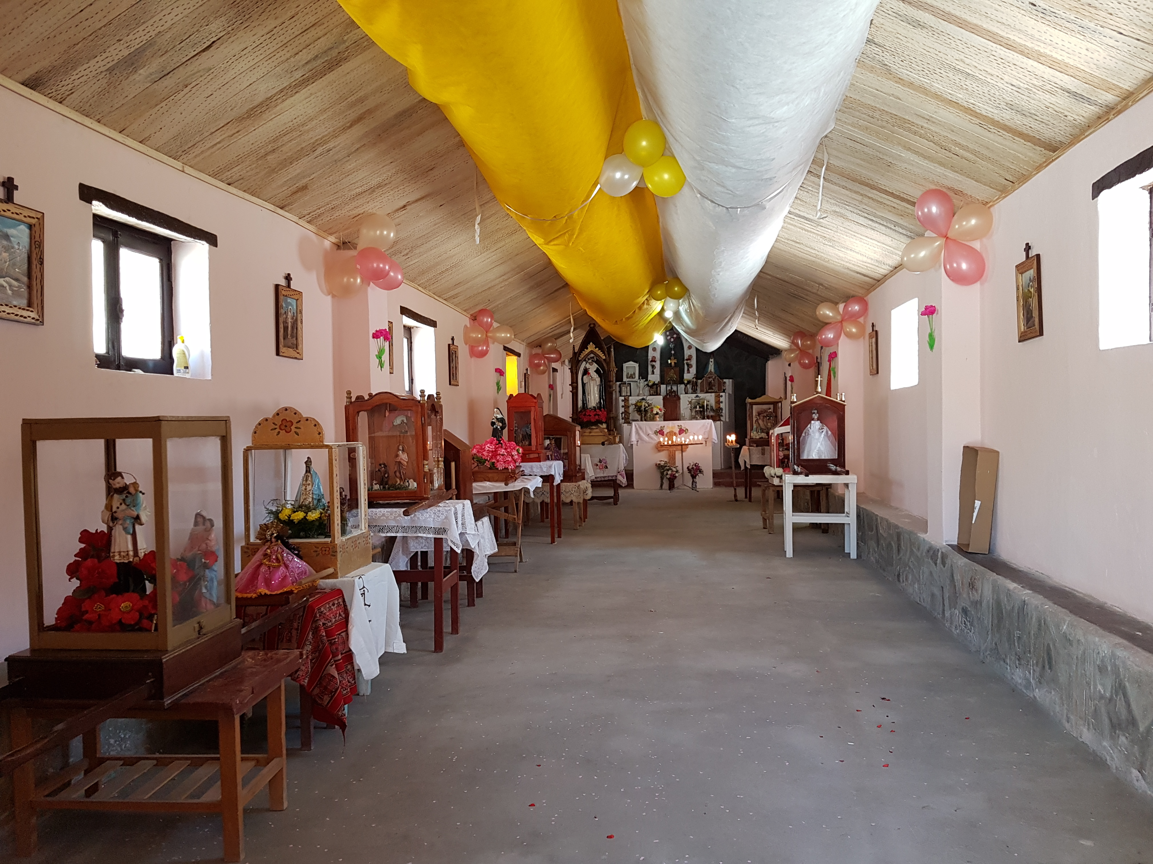 monumento cultural. lugares